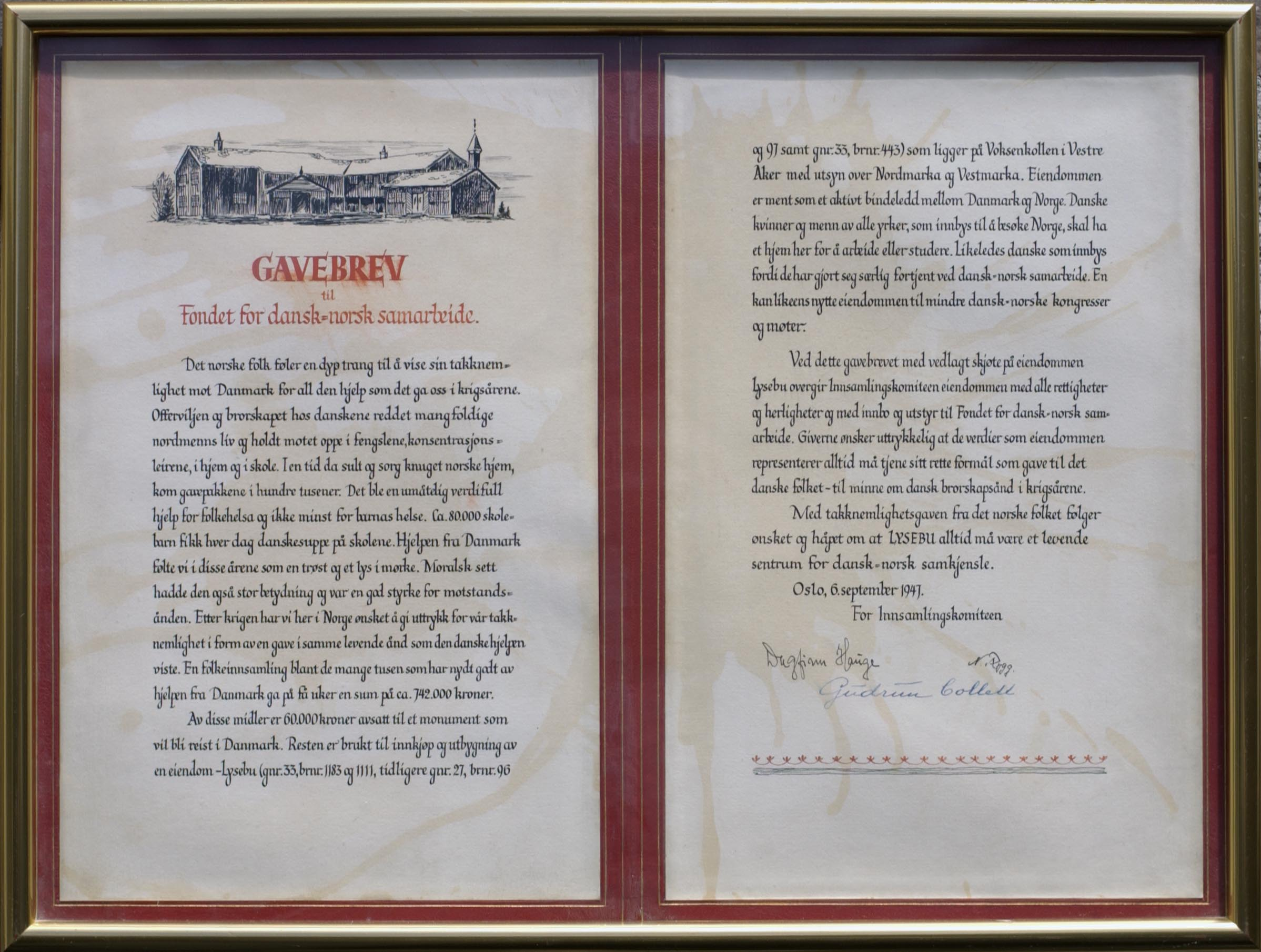 Gavebrev Lysebu til Fondet for dansk-norsk samarbeid